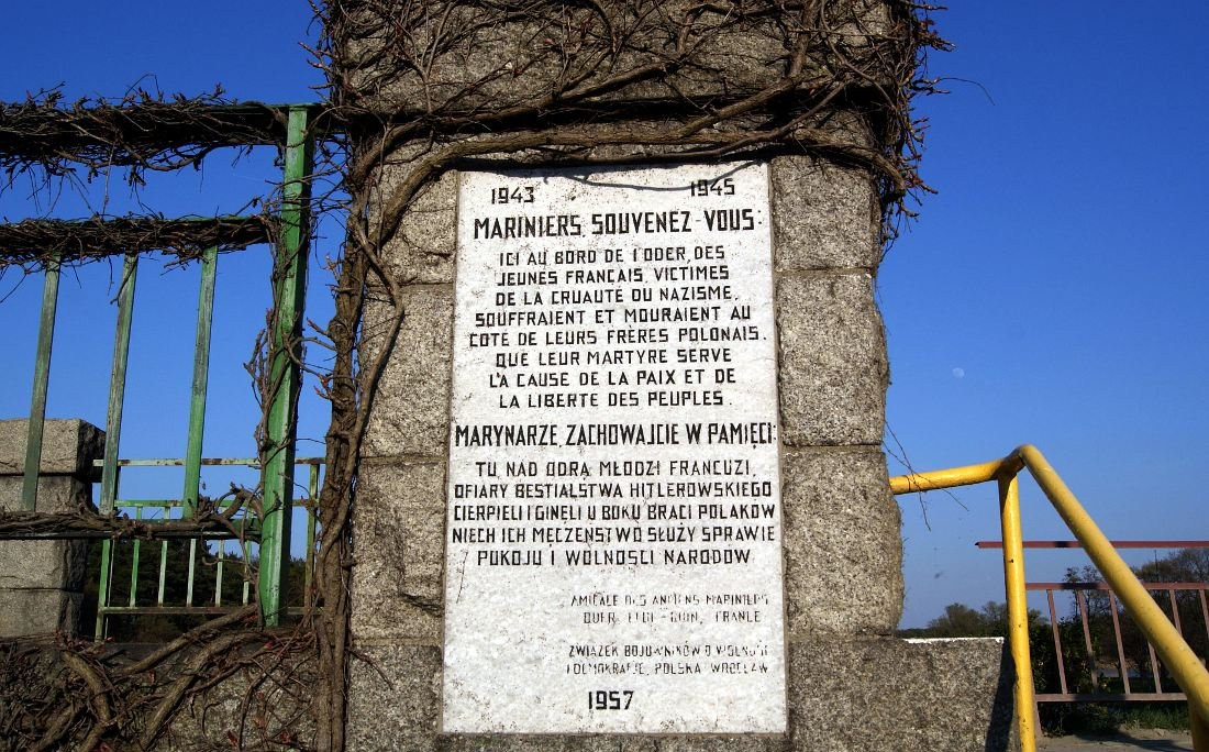 Tablica poświęcona jeńcom francuskim, pracującym przy II śluzie Rędzin we Wrocławiu podczas II wojny światowej, ufundowana przez tkaczy z Lyonu.